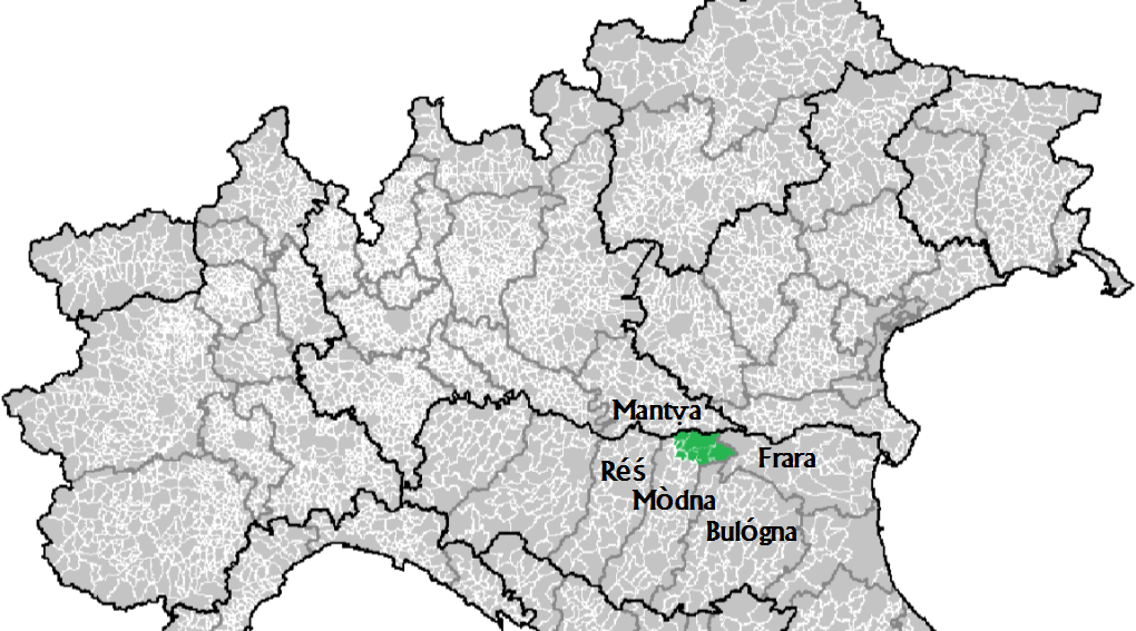 Emiliàn e rumagnòl: Pòst in pruvìnsa ad Mòdna in du a s dascór al dialét miranduléś (in vérd)